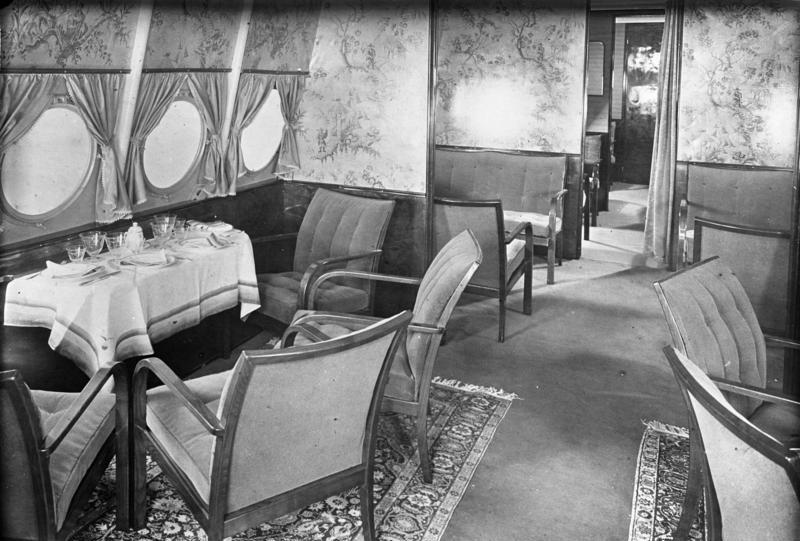 Das deutsche Riesenflugboot "Do X" rüstet für den Amerika-Flug ! Blick in den luxeriös ausgestatteten Speiseraum.